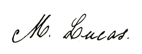 Rinus Lucas signature.